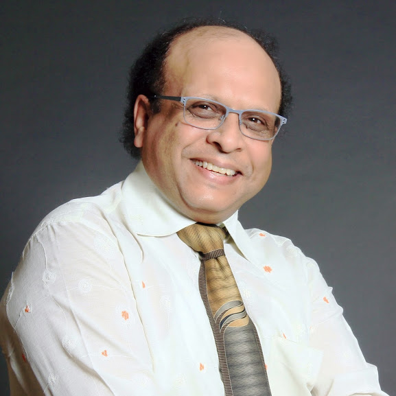 भारत के प्रमुख आर्थोपेडिक सर्जन प्रो. डा. राजू वैश्य